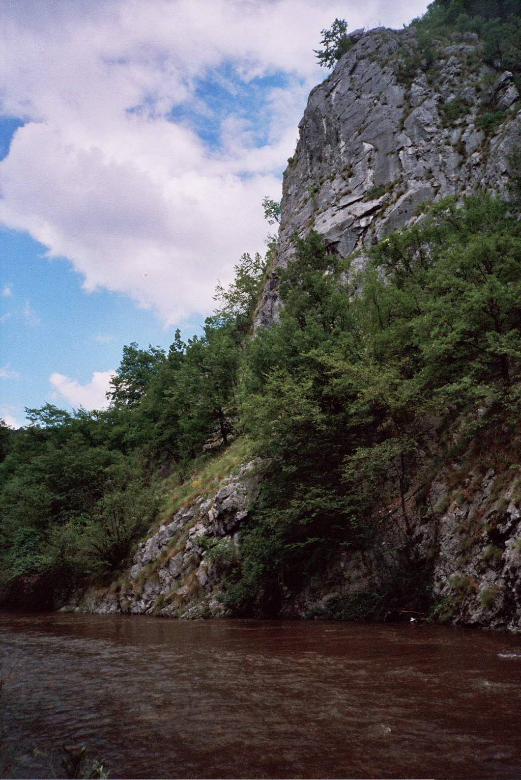 Gradac